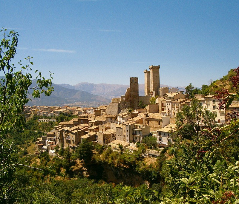 Pacentro categorie:Afbeelding Abruzzen